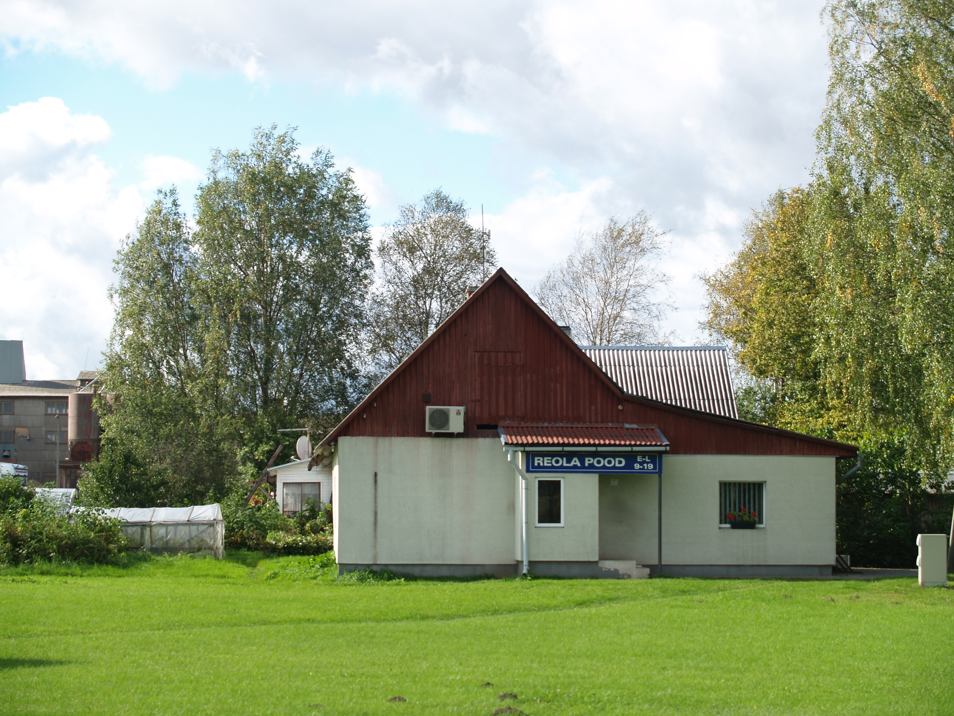 Reola pood.